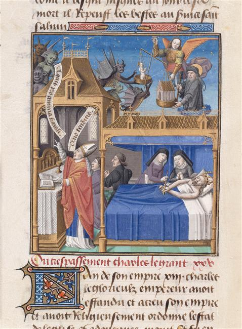 Le Miroir historial de Vincent de Beauvais. Mort de Charlemagne.